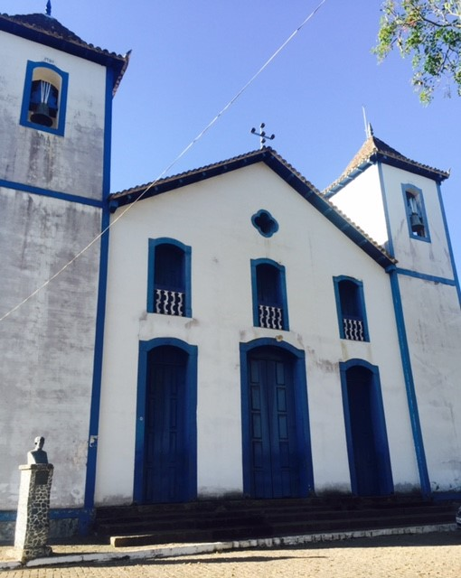 O mais antigo templo religioso de Itapecerica, finalizado em 1801.